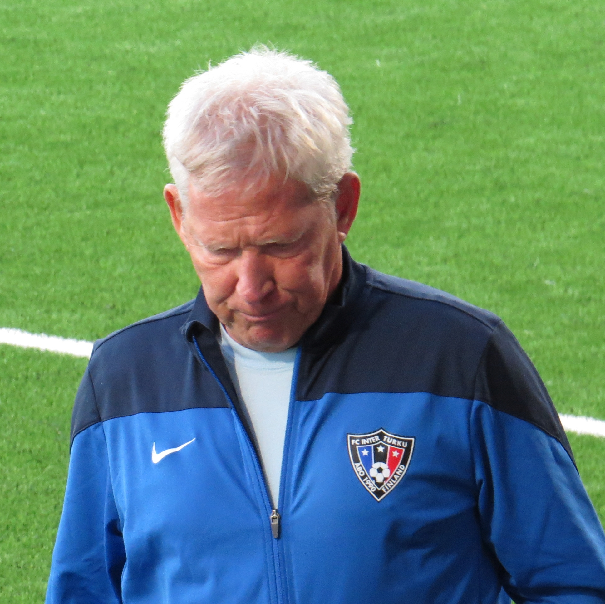 Job Dragtsma, alankomaalainen jalkapallovalmentaja FC Inter Turun valmentajana kaudella 2015.